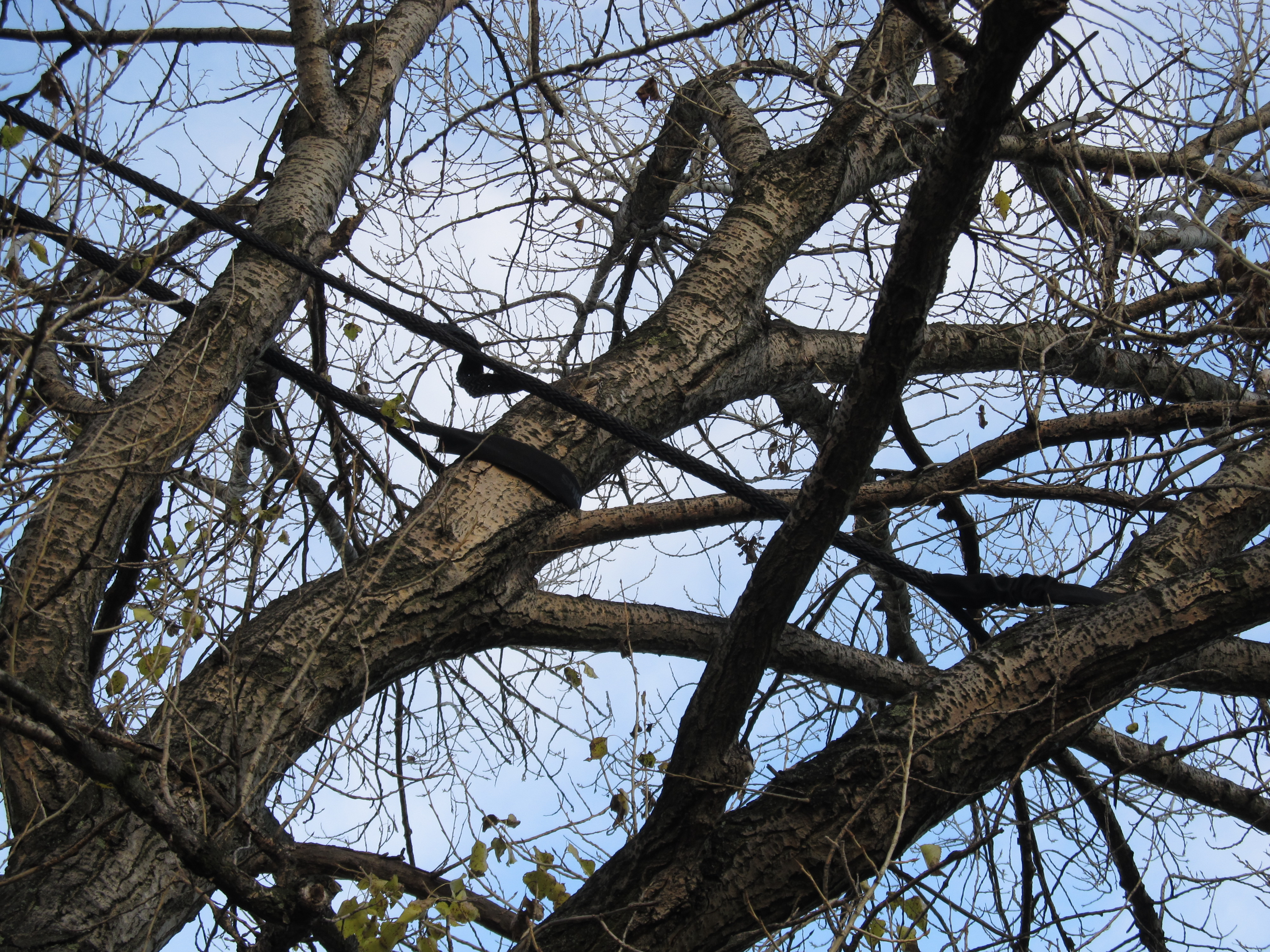 Halteseile für Äste an der Babisnauer Pappel, Gemeinde Kreischa, Landkreis Sächsische Schweiz-Osterzgebirge